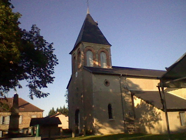 L'Eglise de Mons qui culmine le village sur la butte du "Ronch"